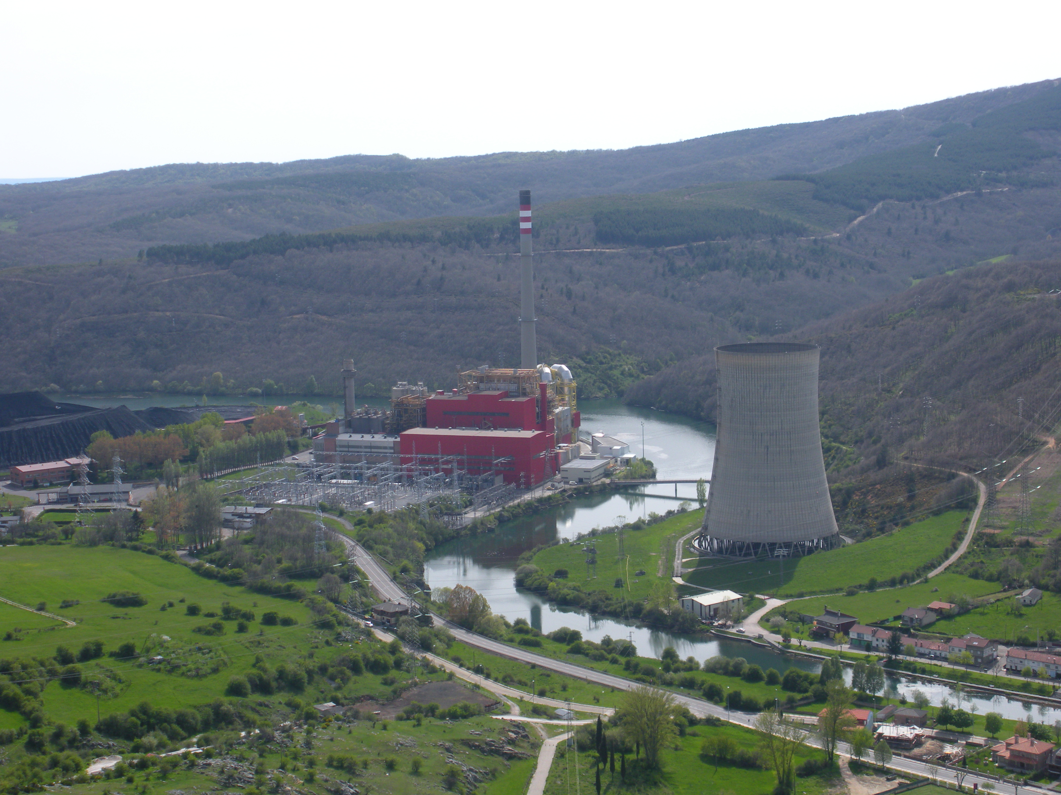 Central térmica de Velilla, en Velilla del Río Carrión, España.